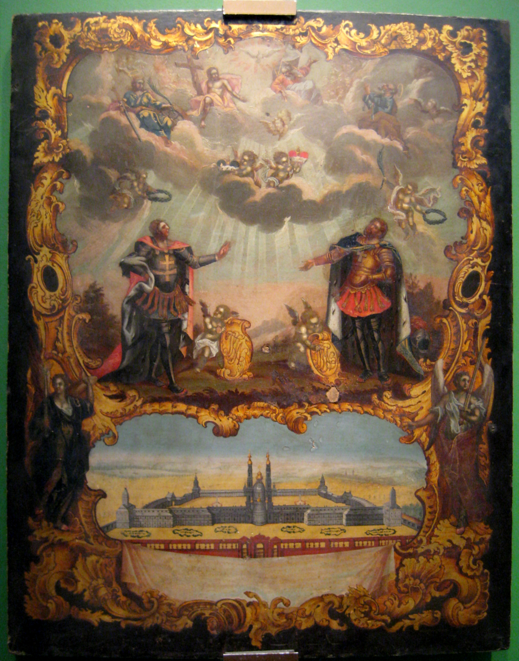 Иван Греков. Середина 18 века. Великий князь Александр Невский и князь Феодор (с видом Александро-Невской лавры). ГТГ. В верхней части иконы изображены князья Александр Невский и его старший брат Феодор, над ними - Новозаветная троица, апостол Петр и святая Екатерина, тезоименитные святые императора Петра I и Екатерины I. В нижней части - Александро-Невский монастырь (до 1755). Внизу иконы помещена пространная надпись: Благословил Троичный Бог Месту сему быти. Зримым же Горе святым тезоимениты. Высокославнейший Петр и Екатерина Россов честь и похвала обое едина Благословение то делом исполняли. Александор с Феодором помощь подавали Их же и телеса зде пребудут во веке. Благодатны верным всем изливая реки. Да лиют же паче всех на Елизавету и наследников ее в чудо всему свету, Что родителей своих дел нет оставляет И свою к Месту сему Маеть продолжает.